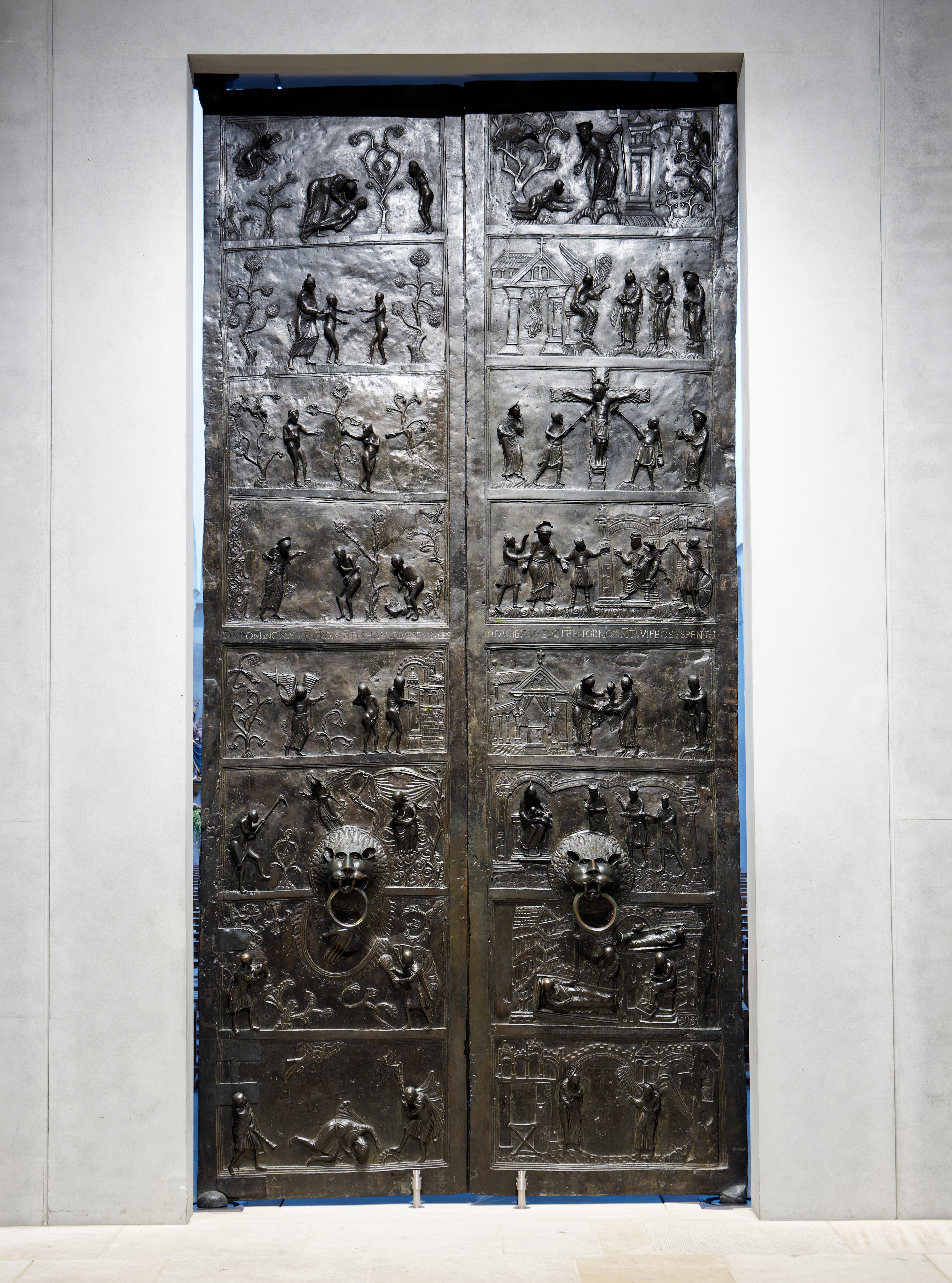 Hildesheimer Dom, St. Mariä Himmelfahrt, zweiflügelige Bernwardtür, Bronzeguss von ca. 1015, 4,72 Meter hoch und etwa 1,5 Meter breit.